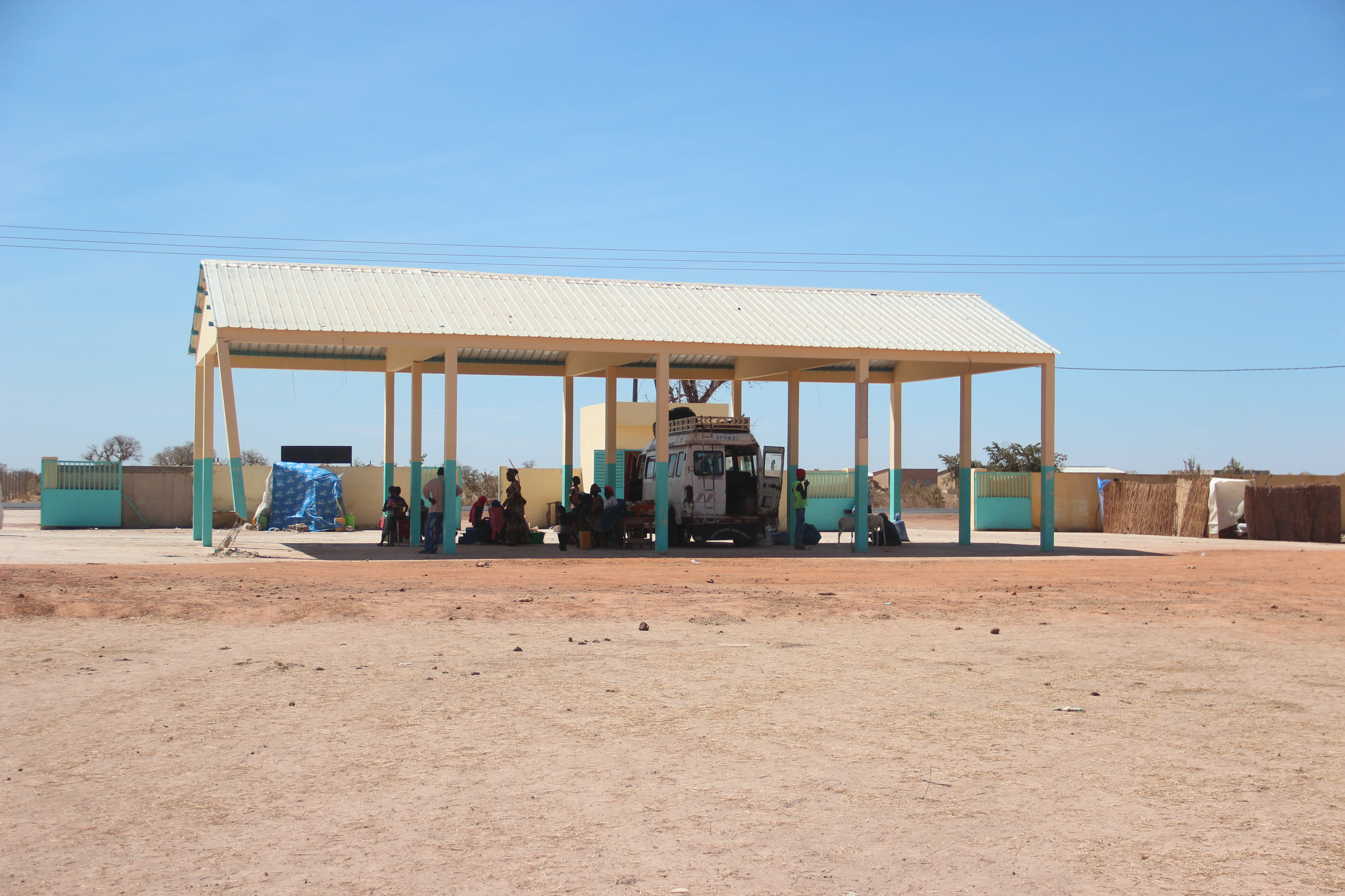 Gare routière de Malem-Hodar (Sénégal). This is an image with the theme "Africa on the Move or Transport" from: Senegal